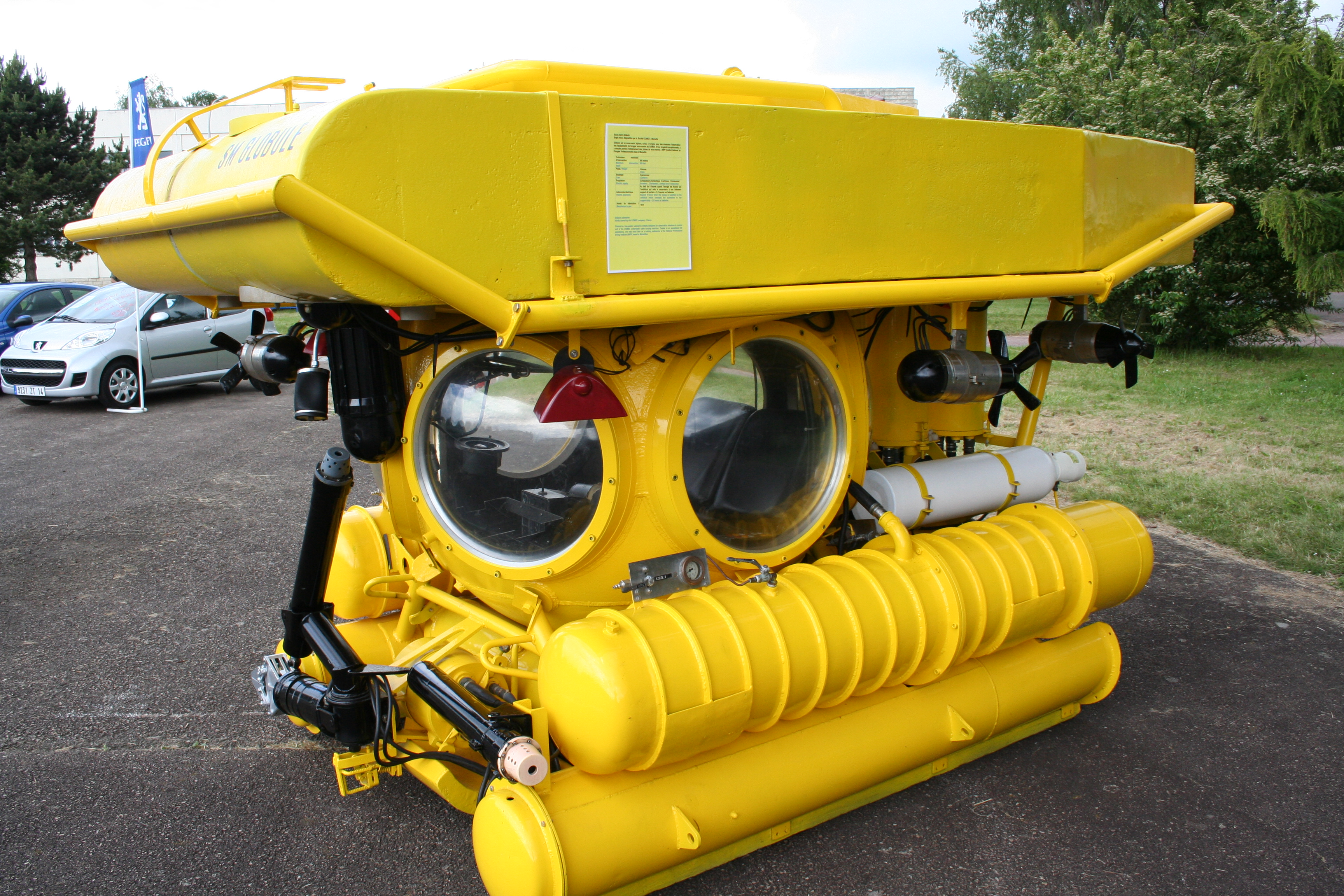 Sous-marin Globule